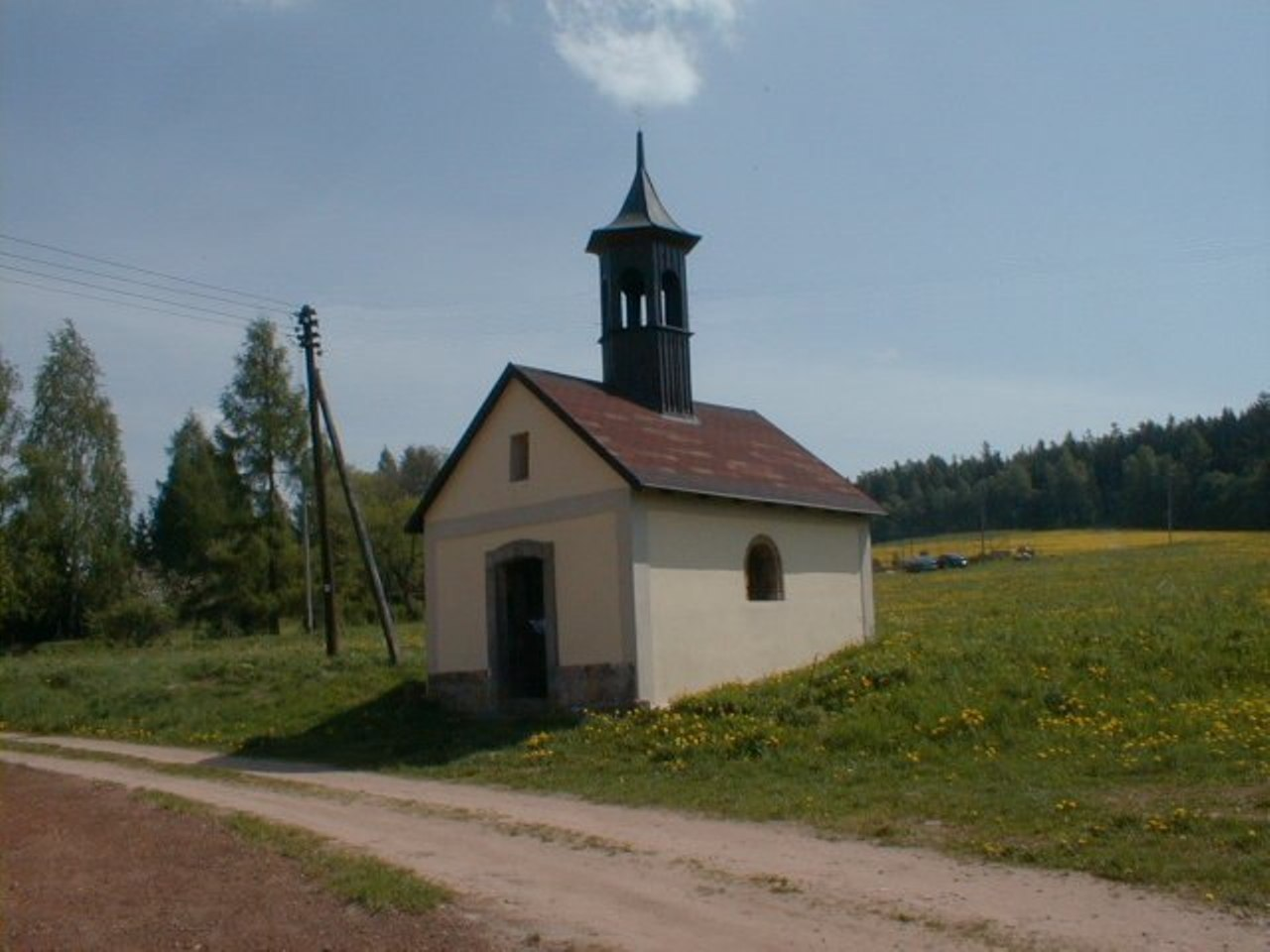 Vítězná - Nové Záboří kapӀička